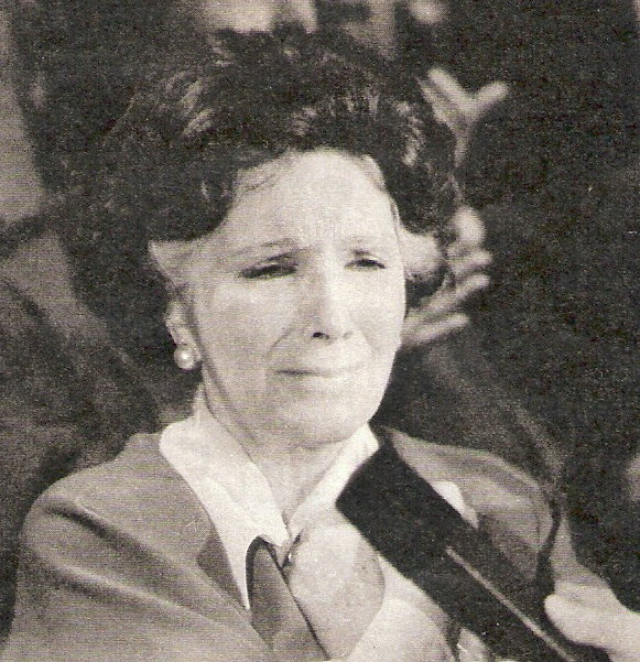 actriz argentina libertad lamarque